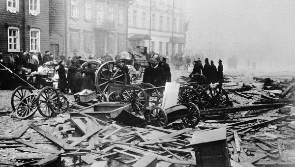 Восстание в Кронштадте: 8 ноября 1905 года